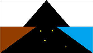 Bandera tehuelche